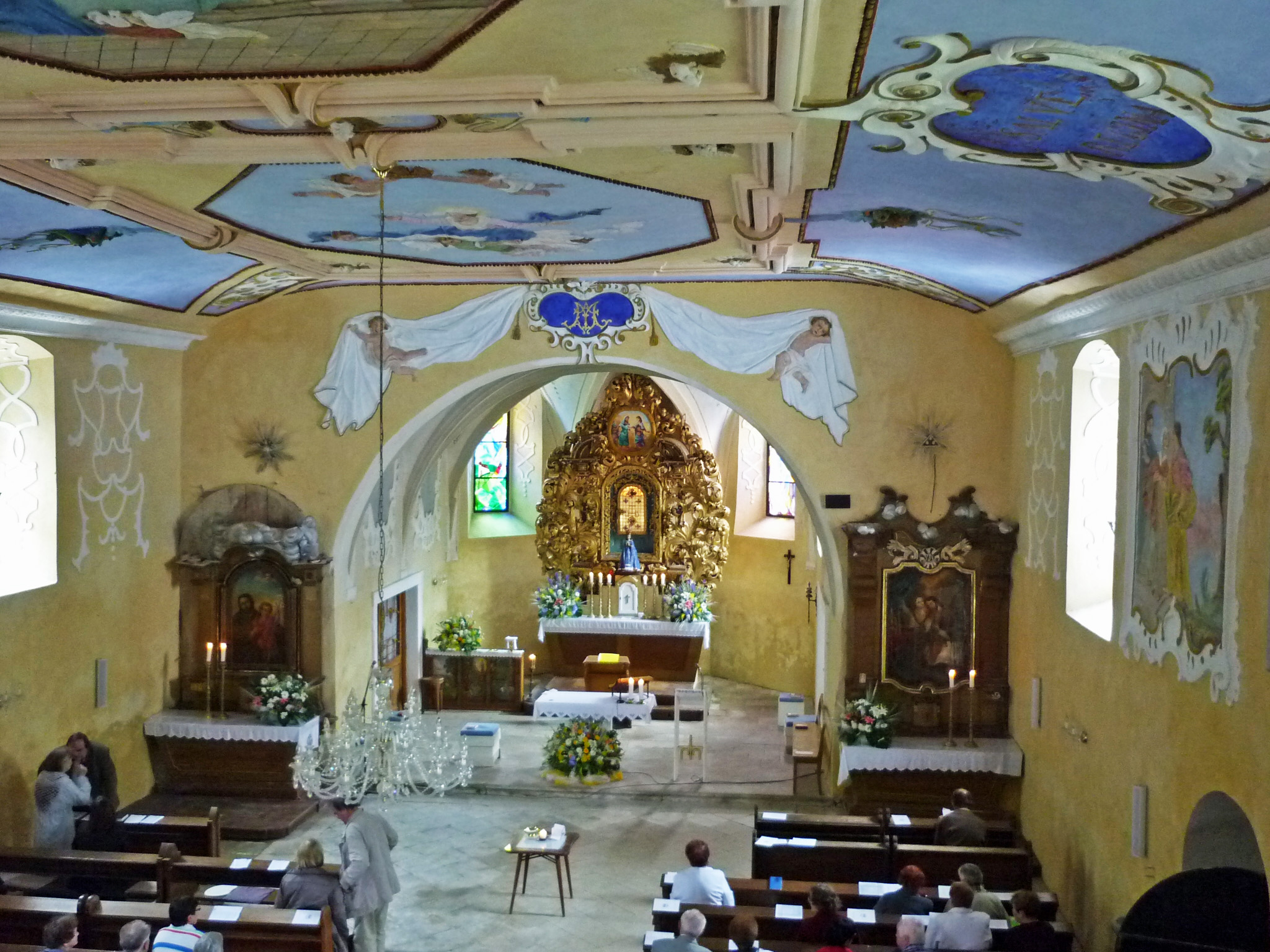 Innenraum der Wallfahrtskirche Mariä Heimsuchung in Quinau (Květnov) bei Komotau (Chomutov)